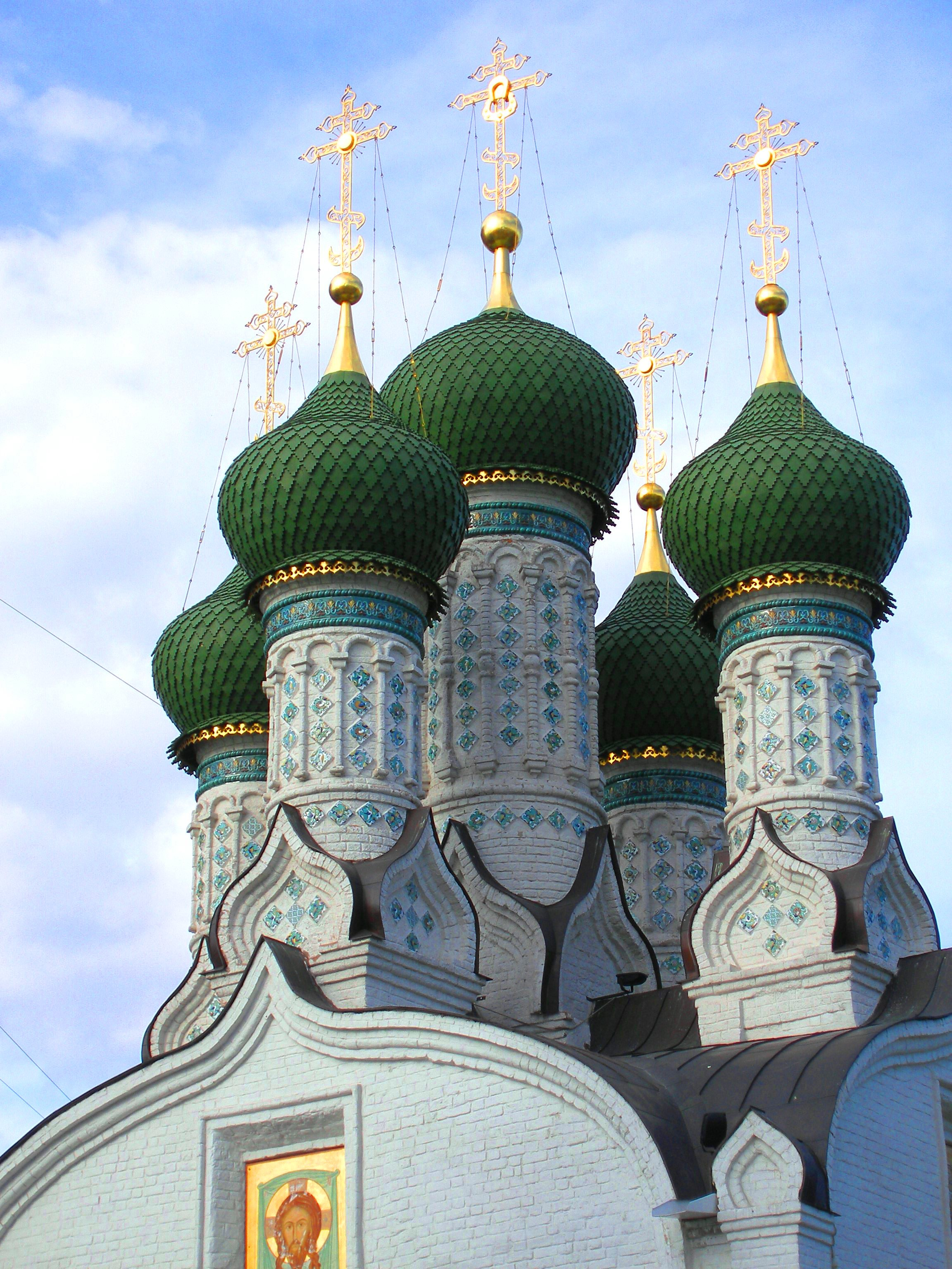 церковь Успения на Откосе (Пресвятой Богородицы на Ильинской горе), Нижний Новгород, Крутой пер., 3